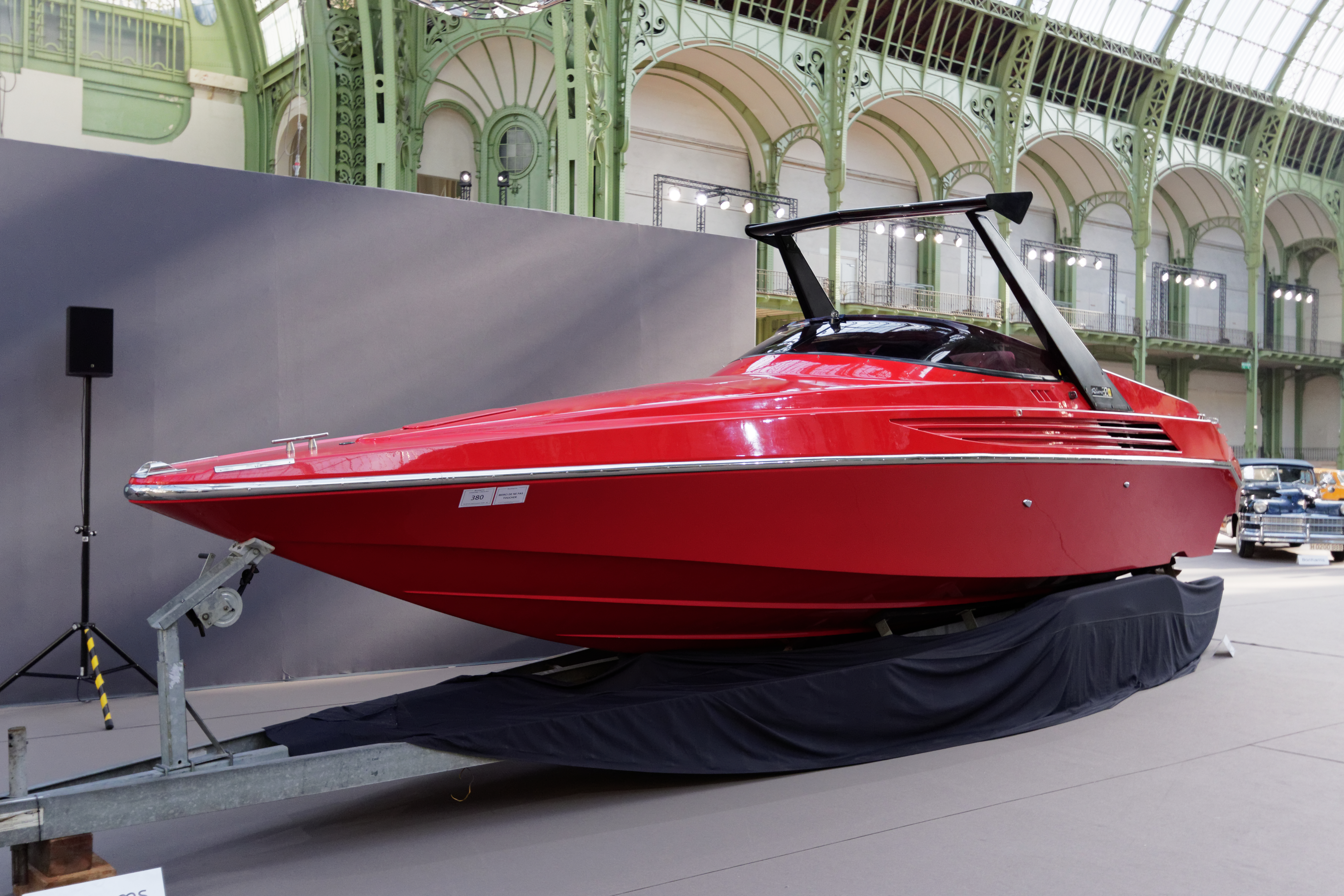 Un des véhicules présenté lors de la vente aux enchères Bonhams 2015 au Grand Palais de Paris.